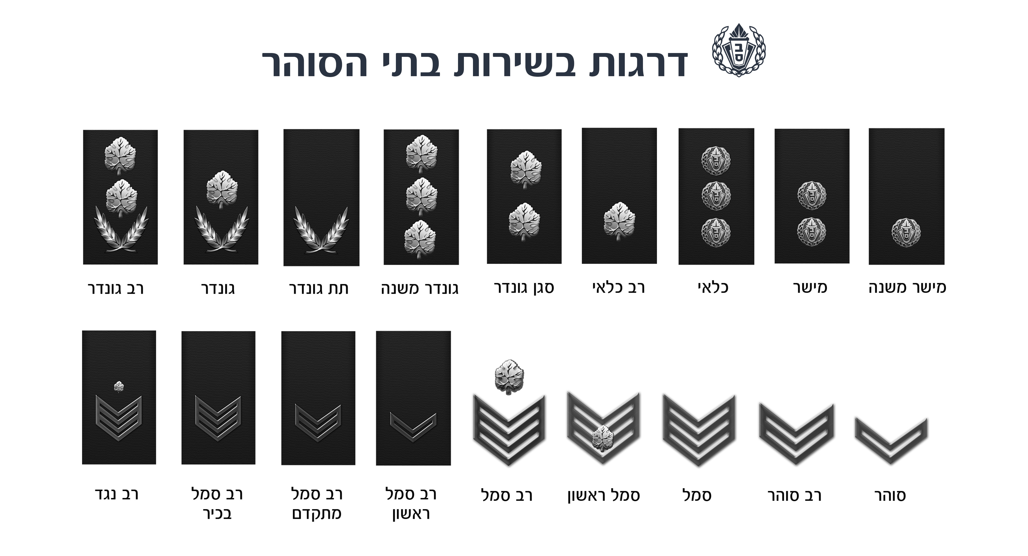 דרגות בשירות בתי הסוהר